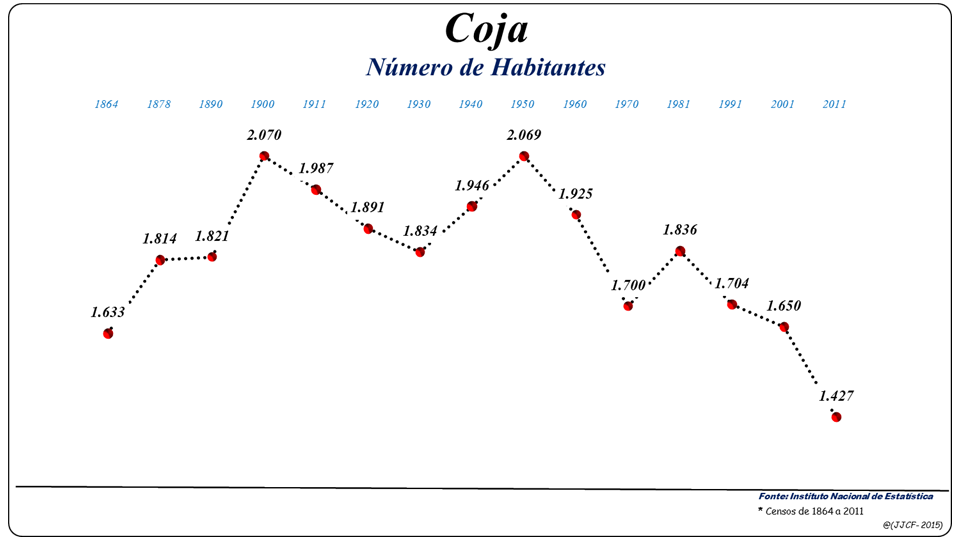 População